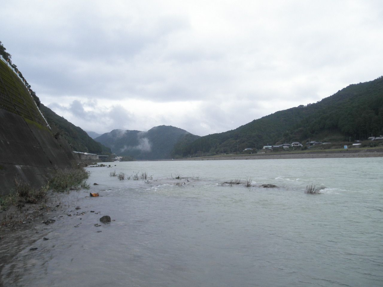 三重県熊野市紀和町小船 北山川